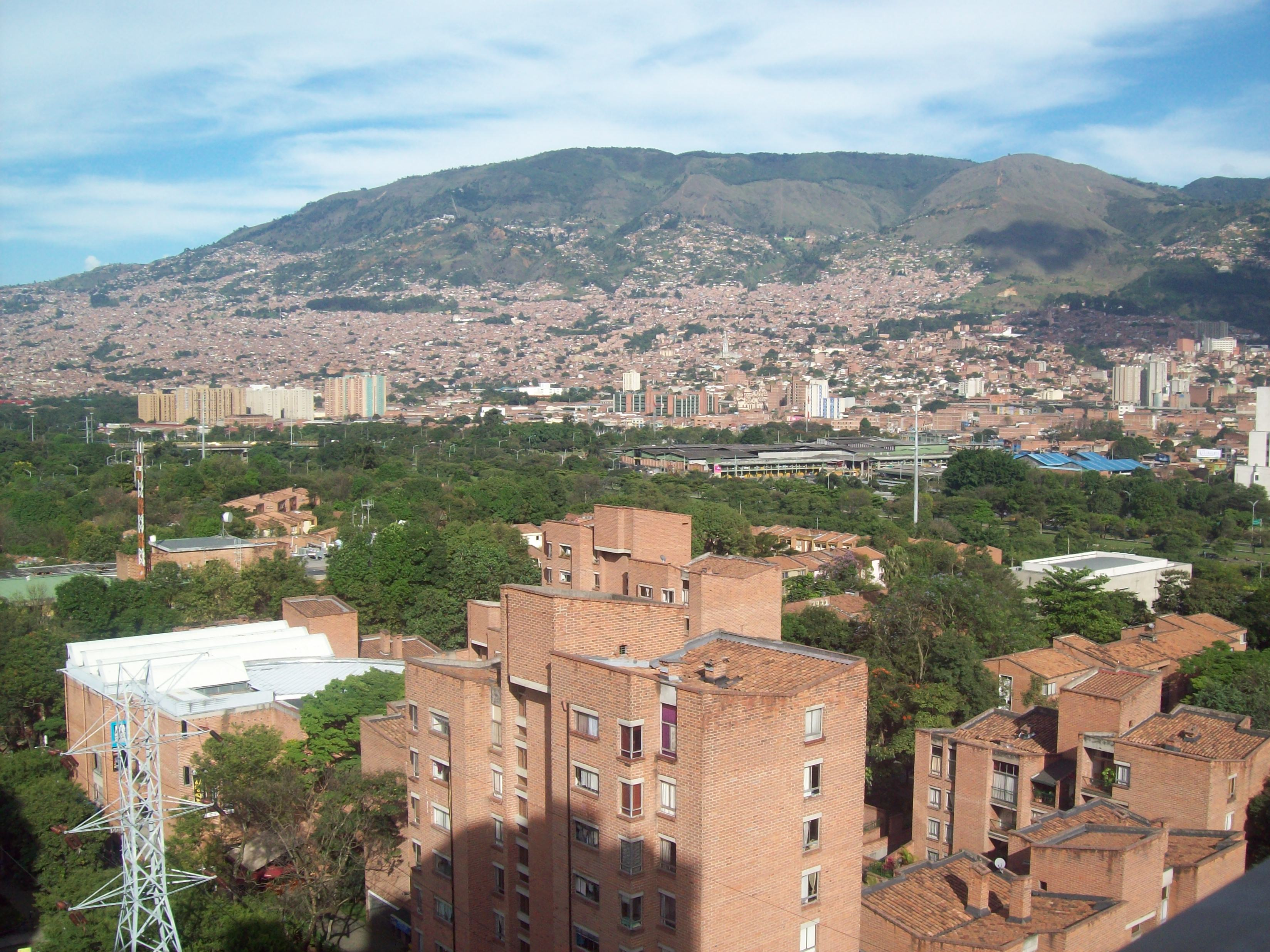 Panorama barrio Carlos E. Restrepo Fotografia tomada desde Edificio Vivaldi